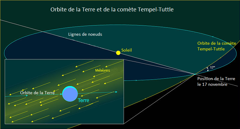 Schéma présentant le croisement entre l'orbite de la Terre et celle de la comète Tempel-Tuttle.